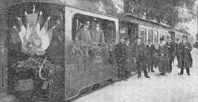 Ingescande orginele krantenknipsel uit 1919 van de opening van de stoomtramlijn Winschoten - Delfzijl